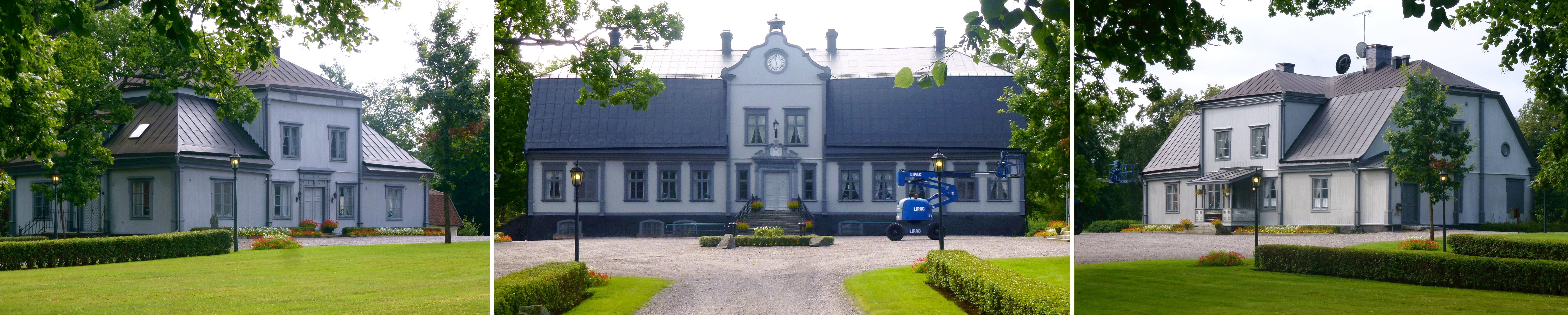 Ludvika herrgård montage (huvudbyggnad och flyglar)